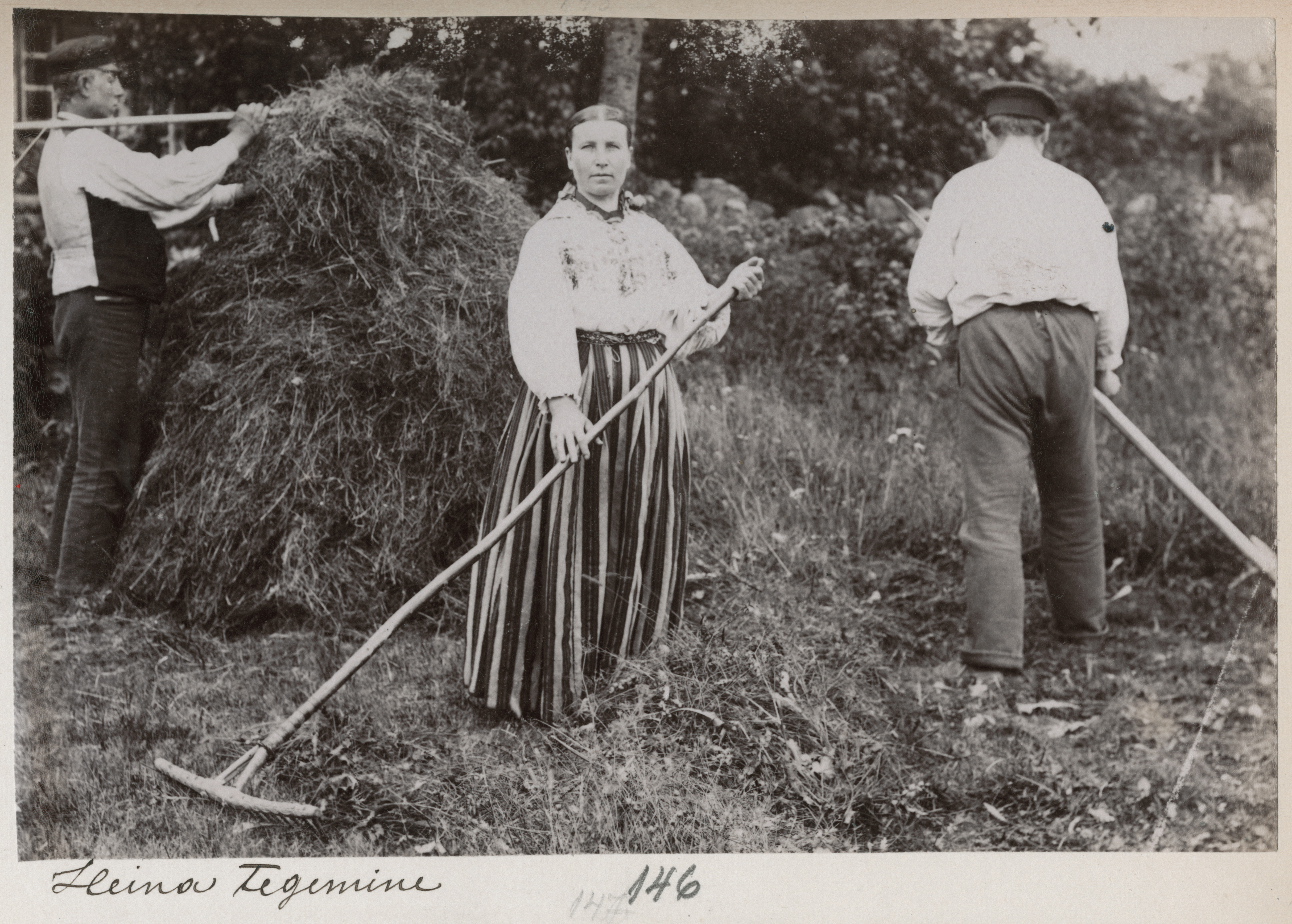 heina tegemine